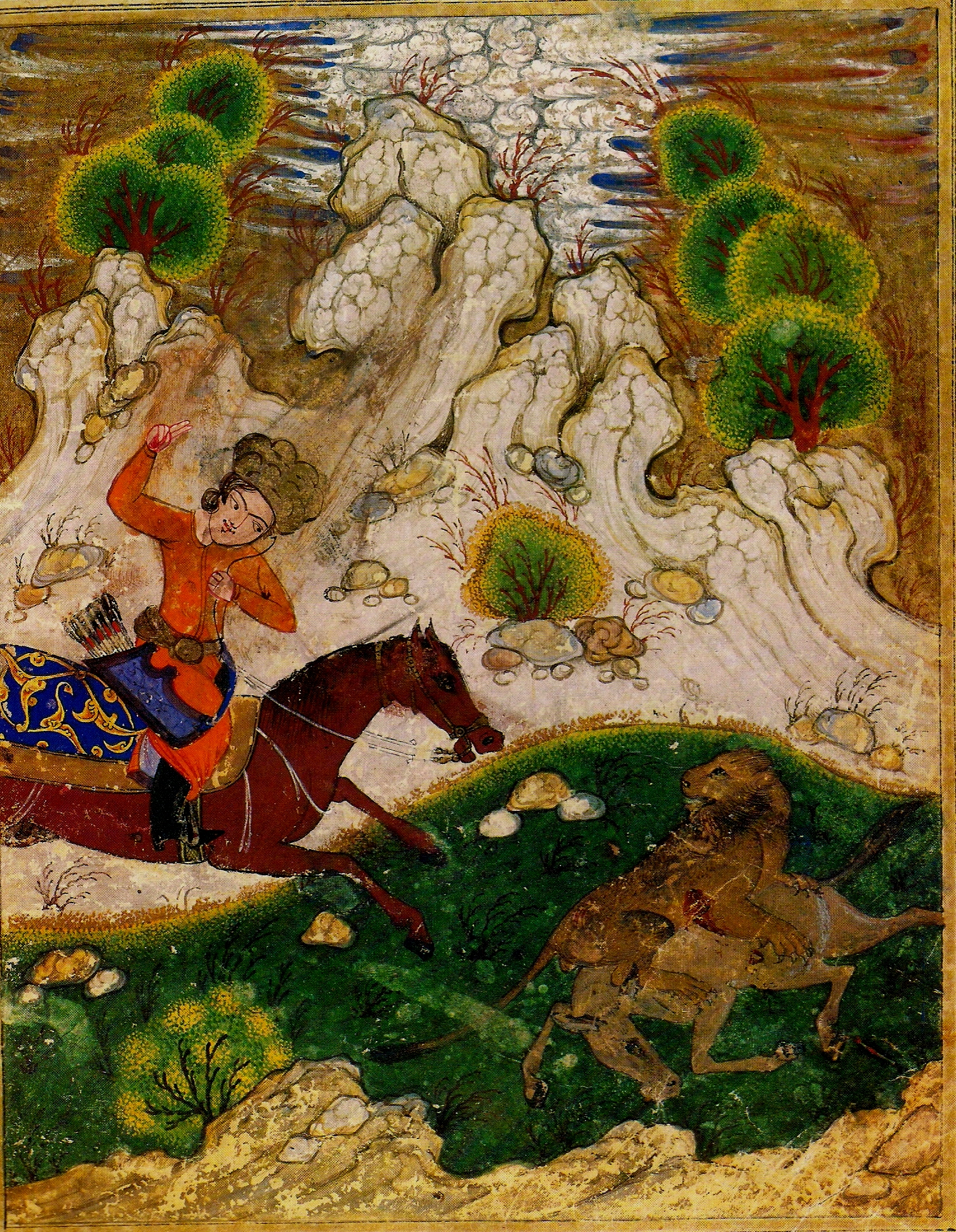 Miniature: Bəhram Gur ov zamanı